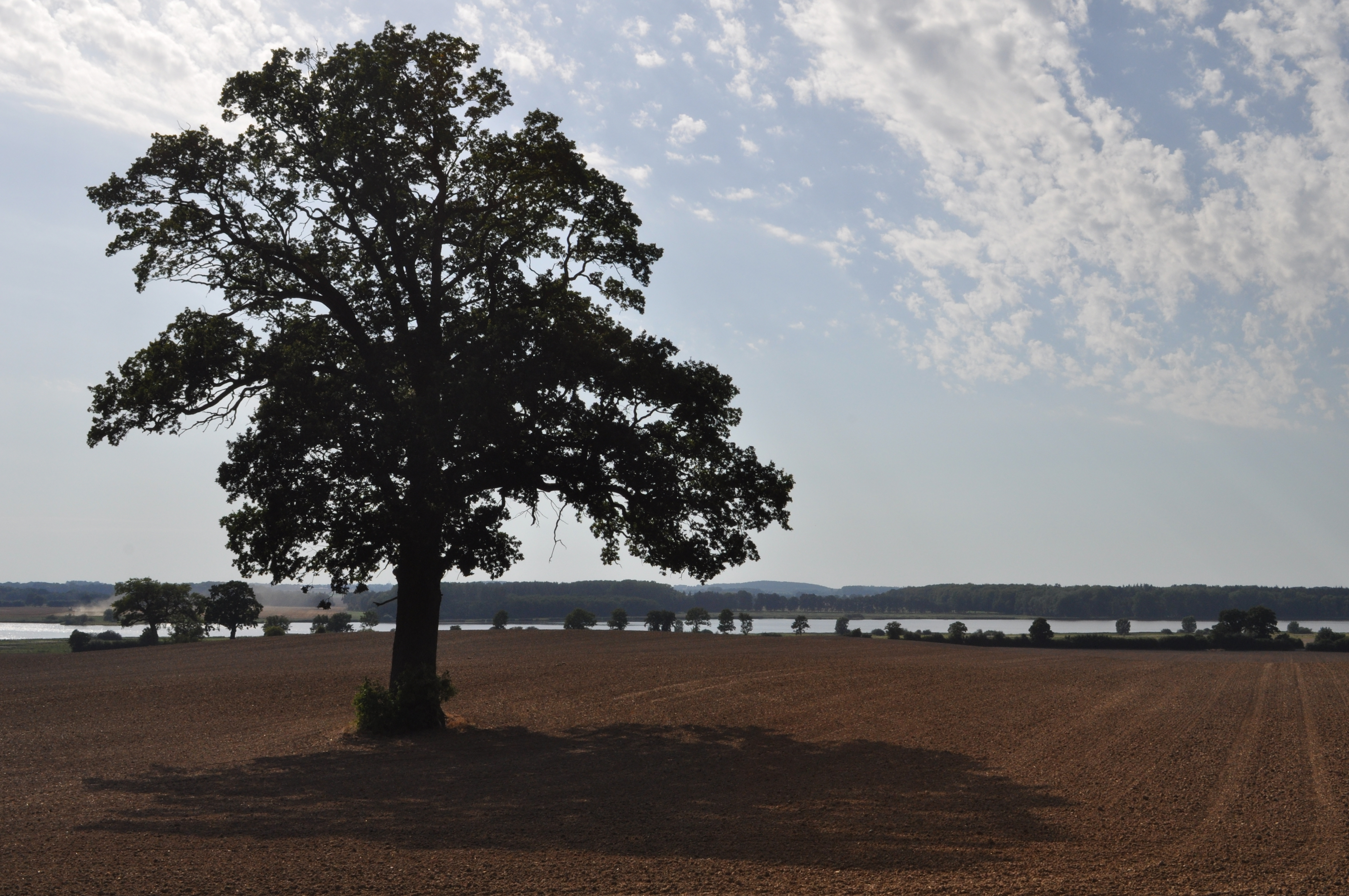 Blick aus der Nähe von Pronstorf auf den Wardersee.